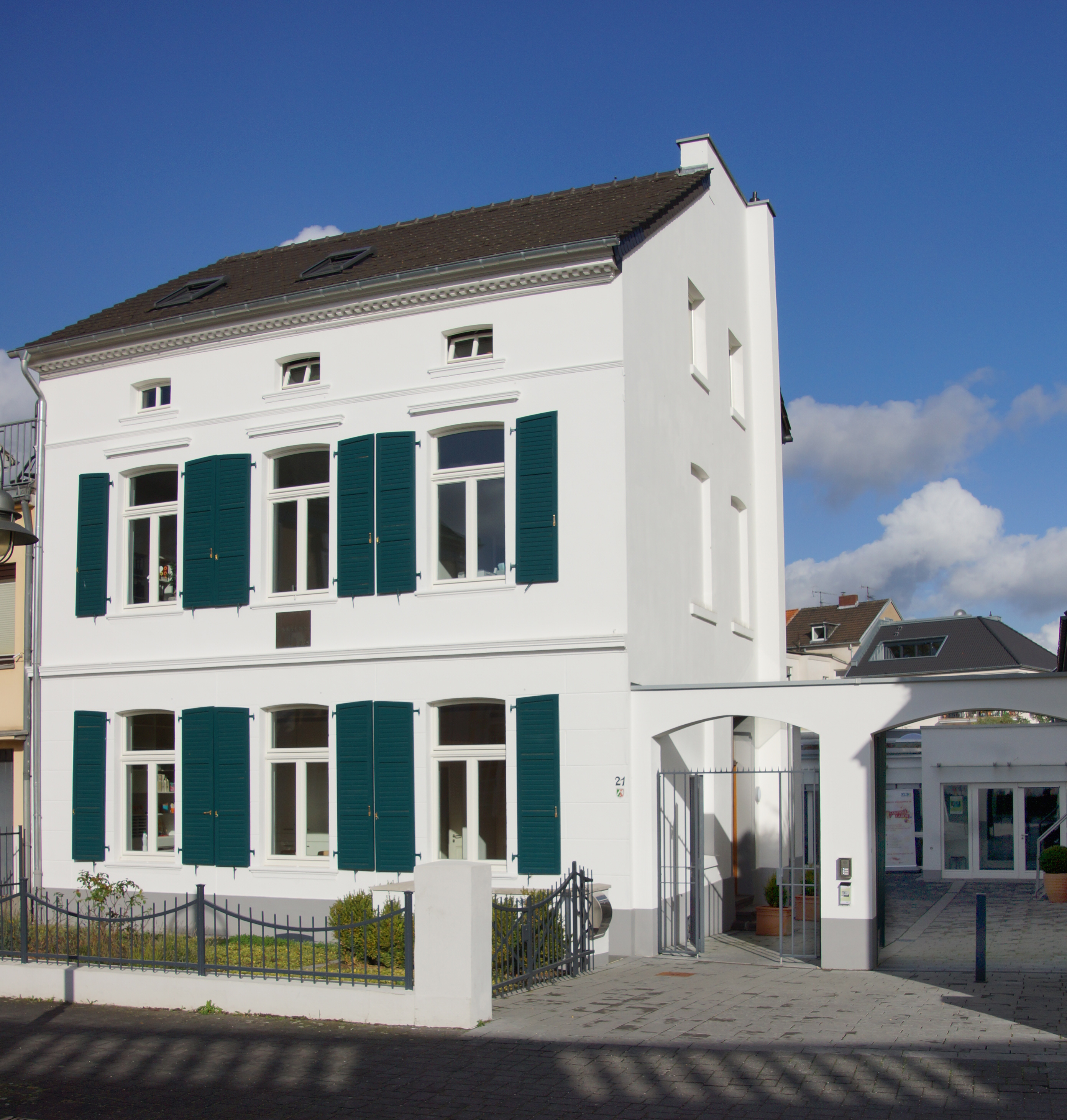 Das Bild zeigt das Geburtshaus von Max Ernst sowie den Erweiterungsbau, der das Fantasie Labor, die Kreativräume des Max Ernst Museums, beherbergt.